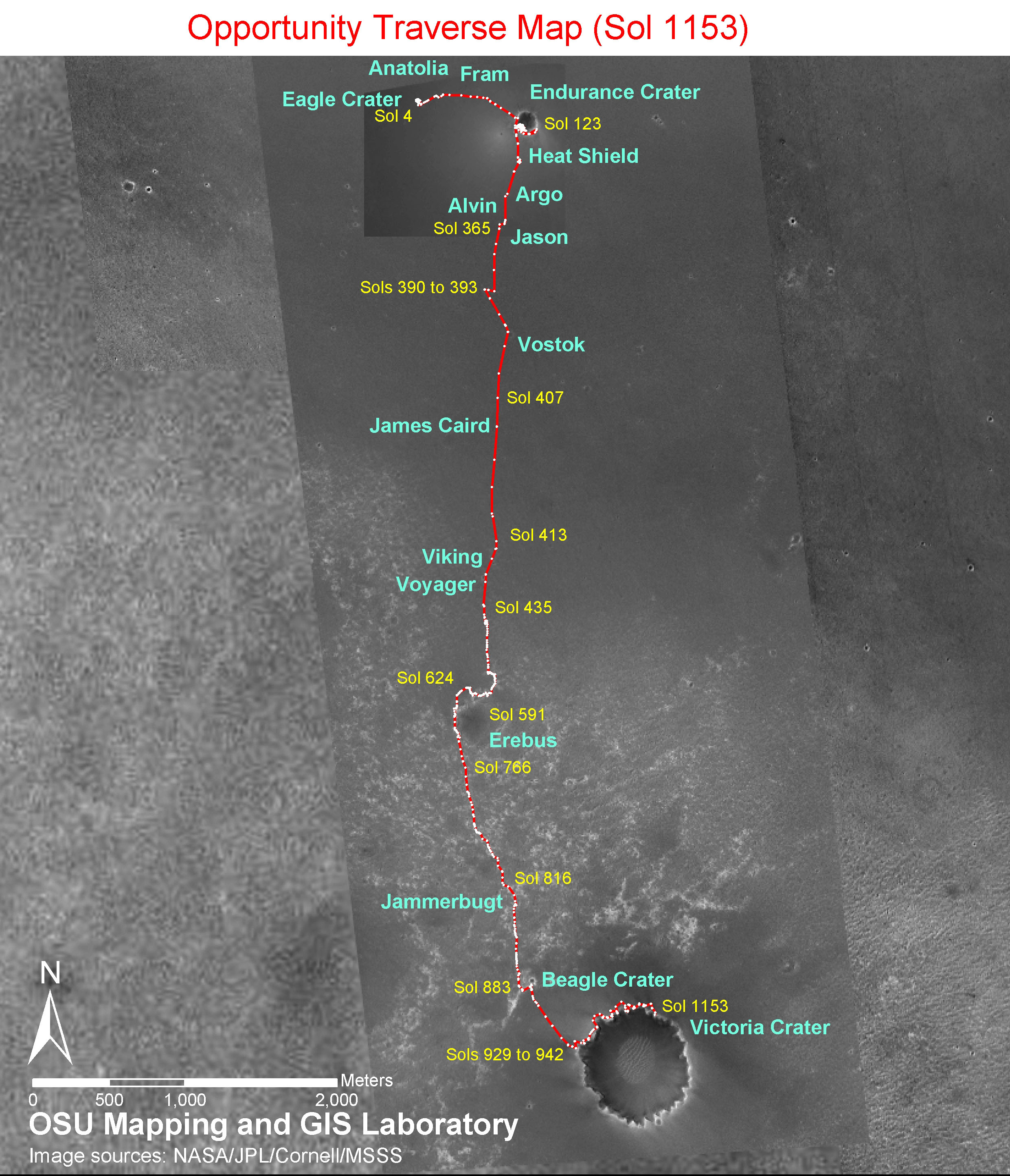 Kart vum Opportunity.